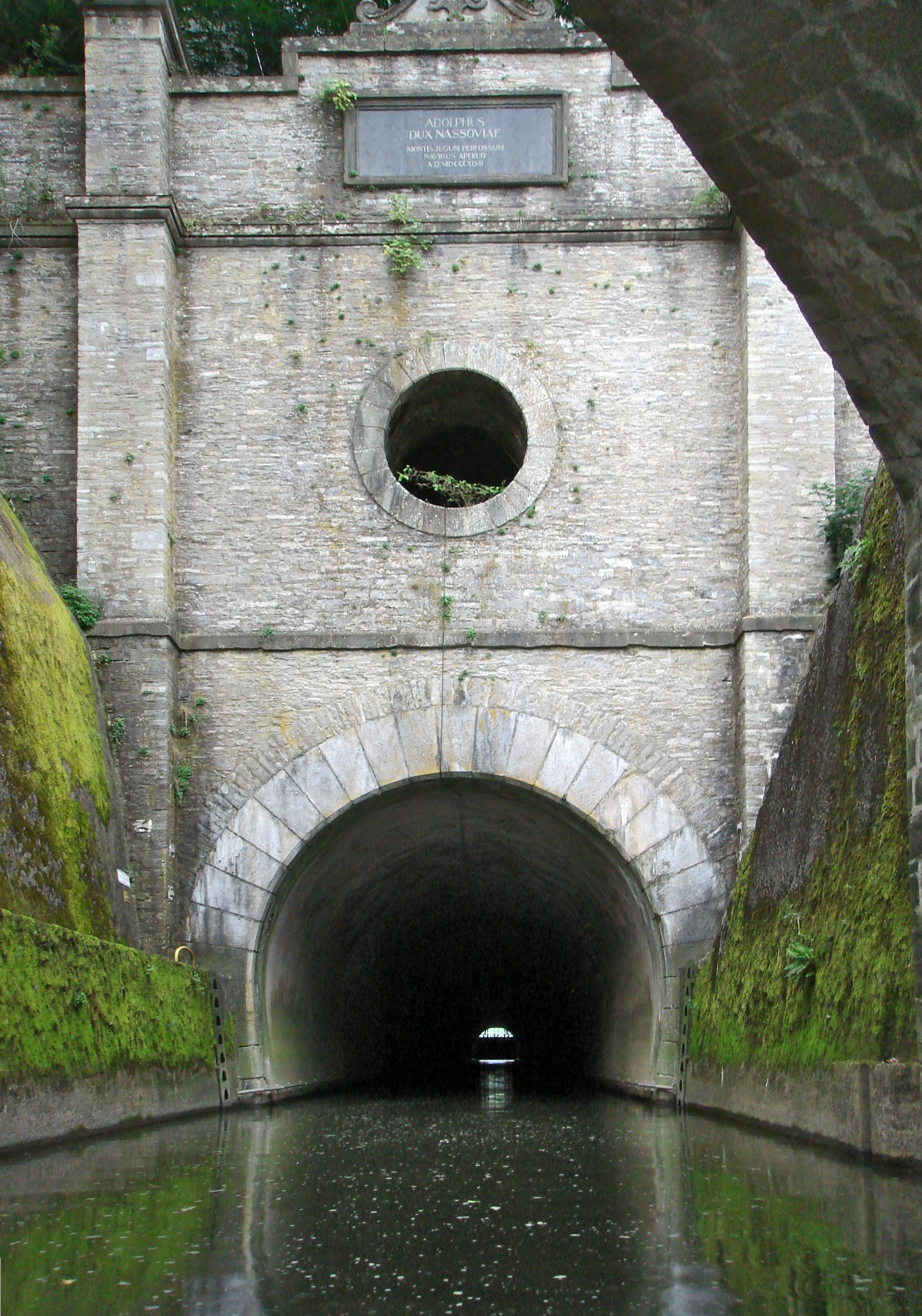 Einfahrt des Weilburger Schifffahrtstunnels mit der folgenden Inschrift: ADOLPHUS DUX NASSOVIAE MONTIS JUGUM PERFOSSUM NAVIBUS APERUIT A.D.MDCCCXLVII oder ins Deutsche übertragen (von LiliCharlie): ADOLPH HERZOG VON NASSAU DAS DURCHBOHRTE BERGESJOCH HAT SICH DEN SCHIFFEN GEÖFFNET IM JAHRE DES HERRN 1847